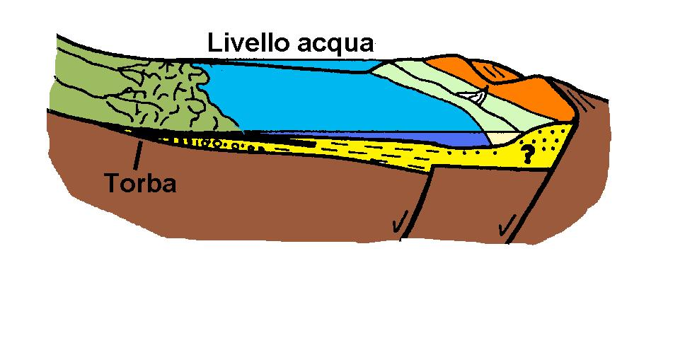 Prima fase fluvio-lacustre con lo sviluppo di una torbiera